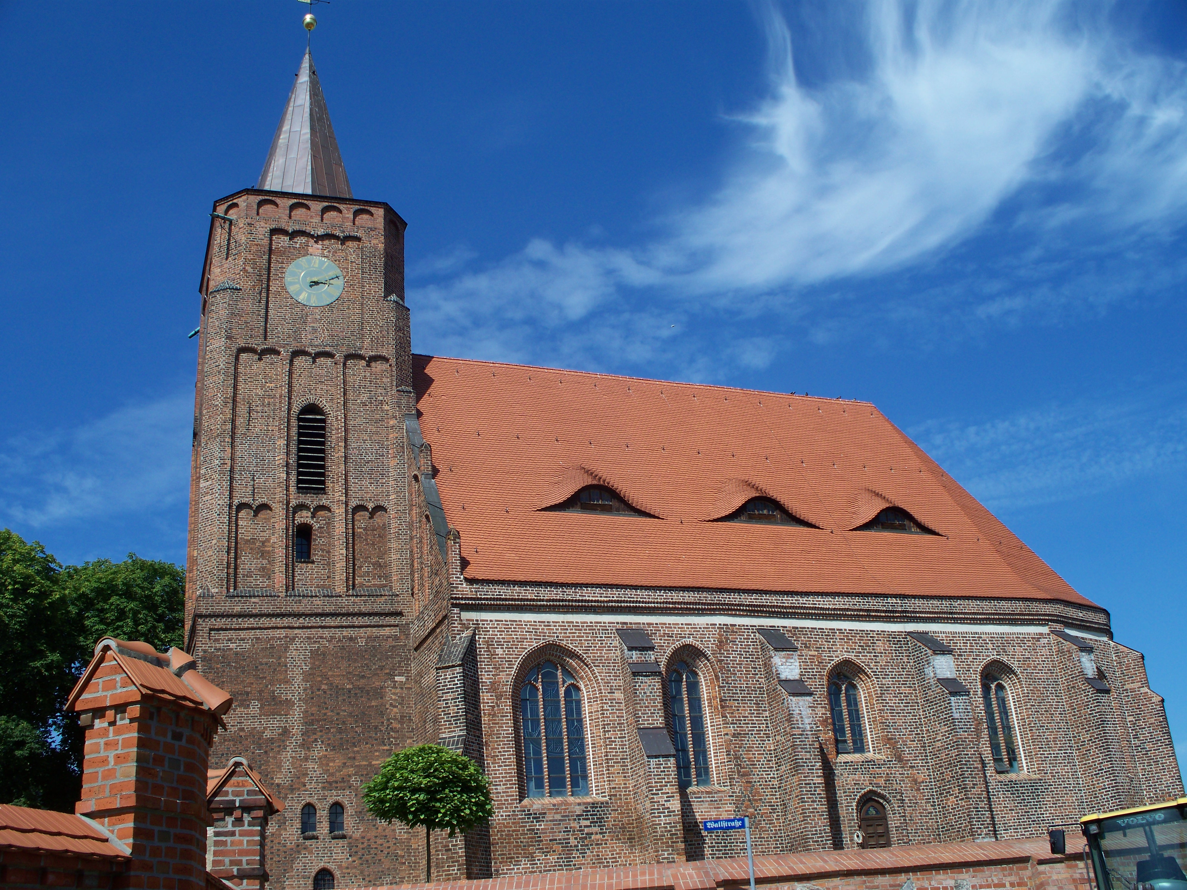 Nikolai-Kirche in Fürstenberg (Oder)